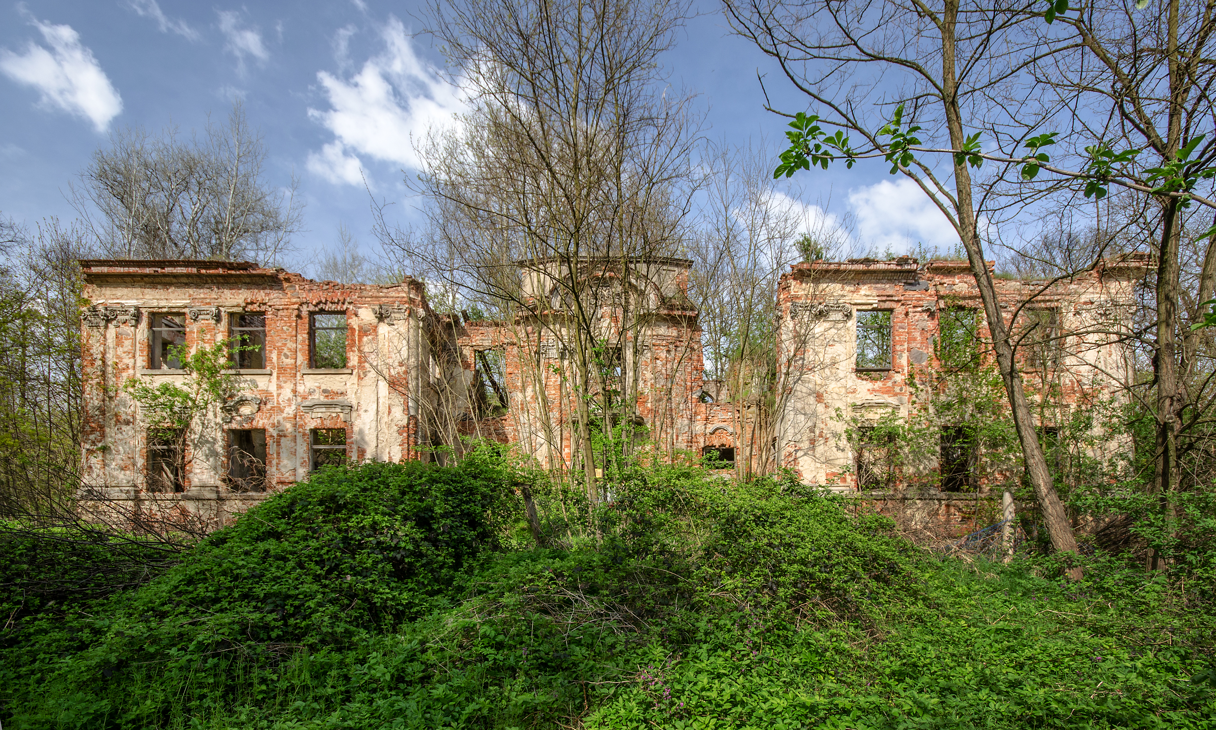 Dziesław, pałac, XVIII, XIX